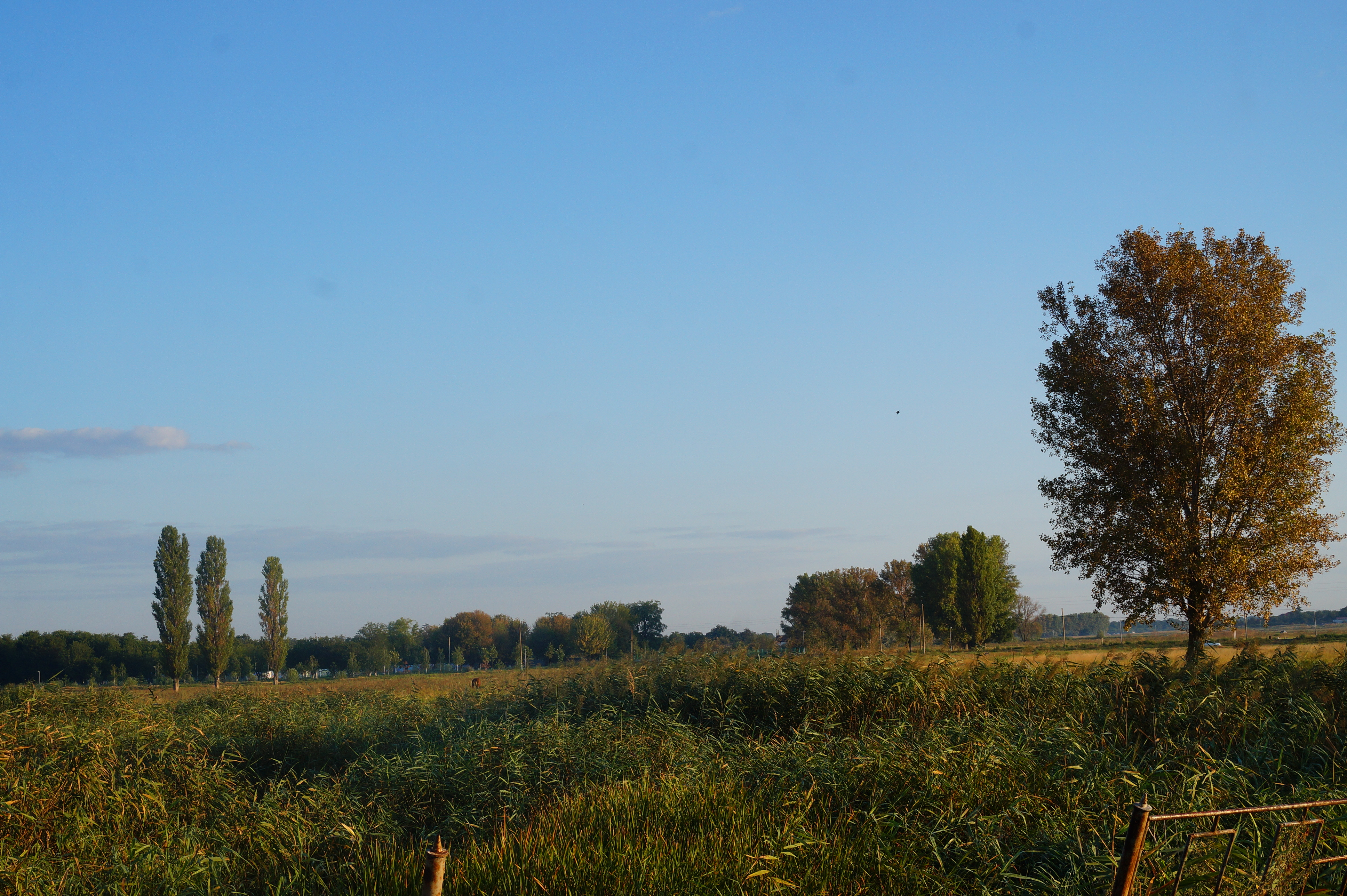 Дальник, міст через заболочену річку Барабой